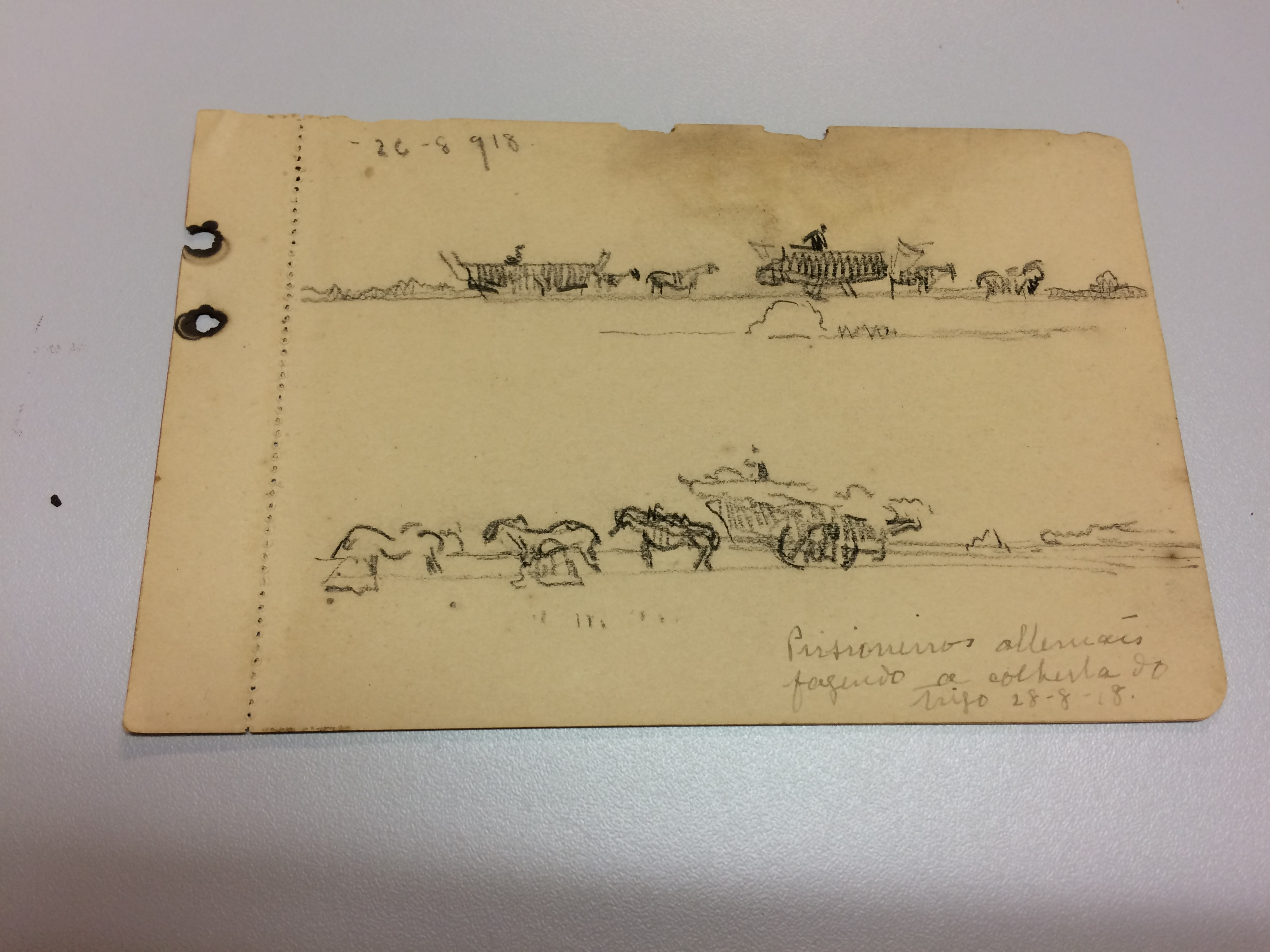 Desenho do caderno de anotações de Eliseu Visconti. Carroças puxadas por bois que representariam prisioneiros alemães na colheita do trigo, ao final da primeira guerra. Esboço para a pintura Colheita do Trigo